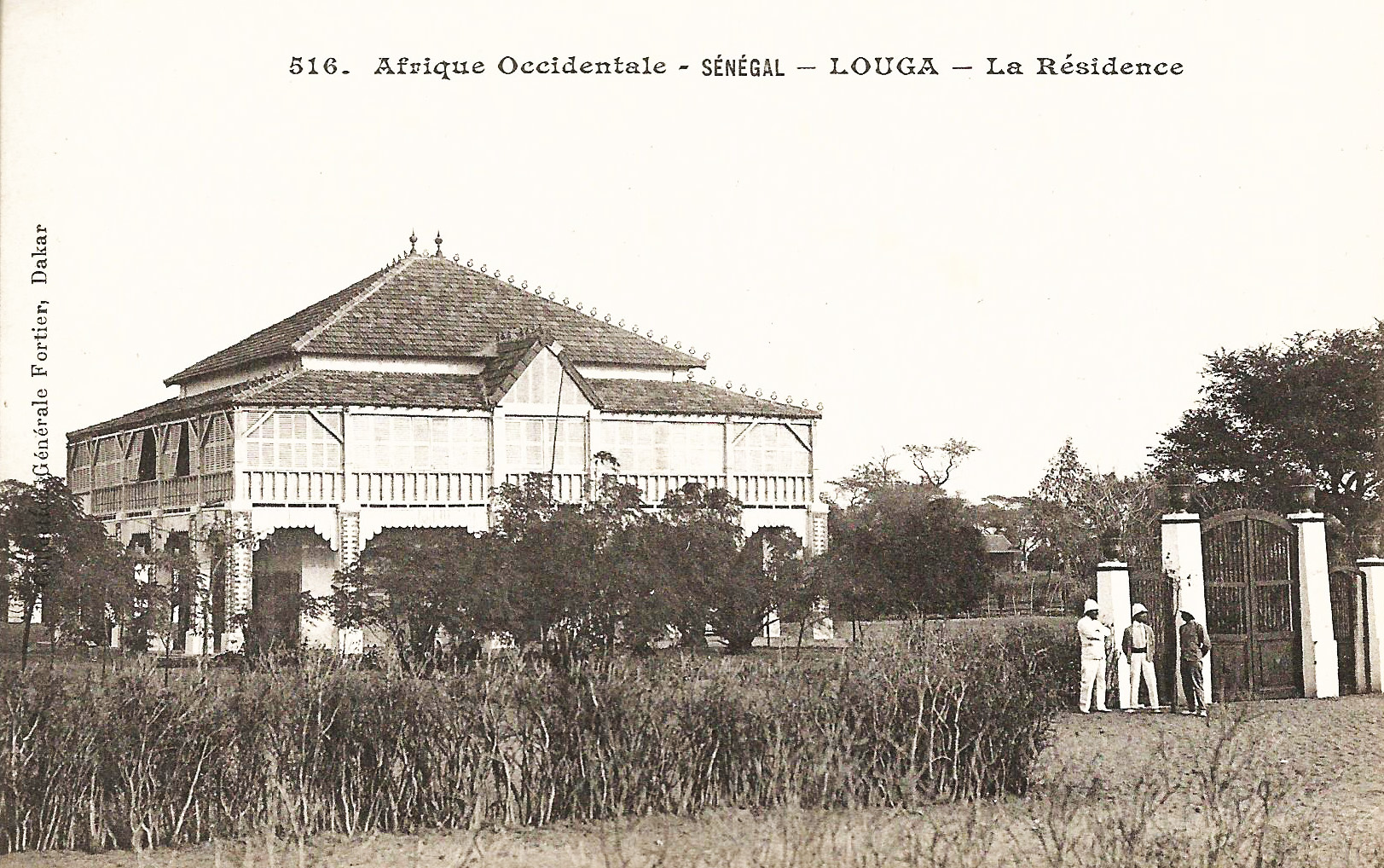 François-Edmond Fortier, Louga. La Résidence. Afrique Occidentale - Sénégal.